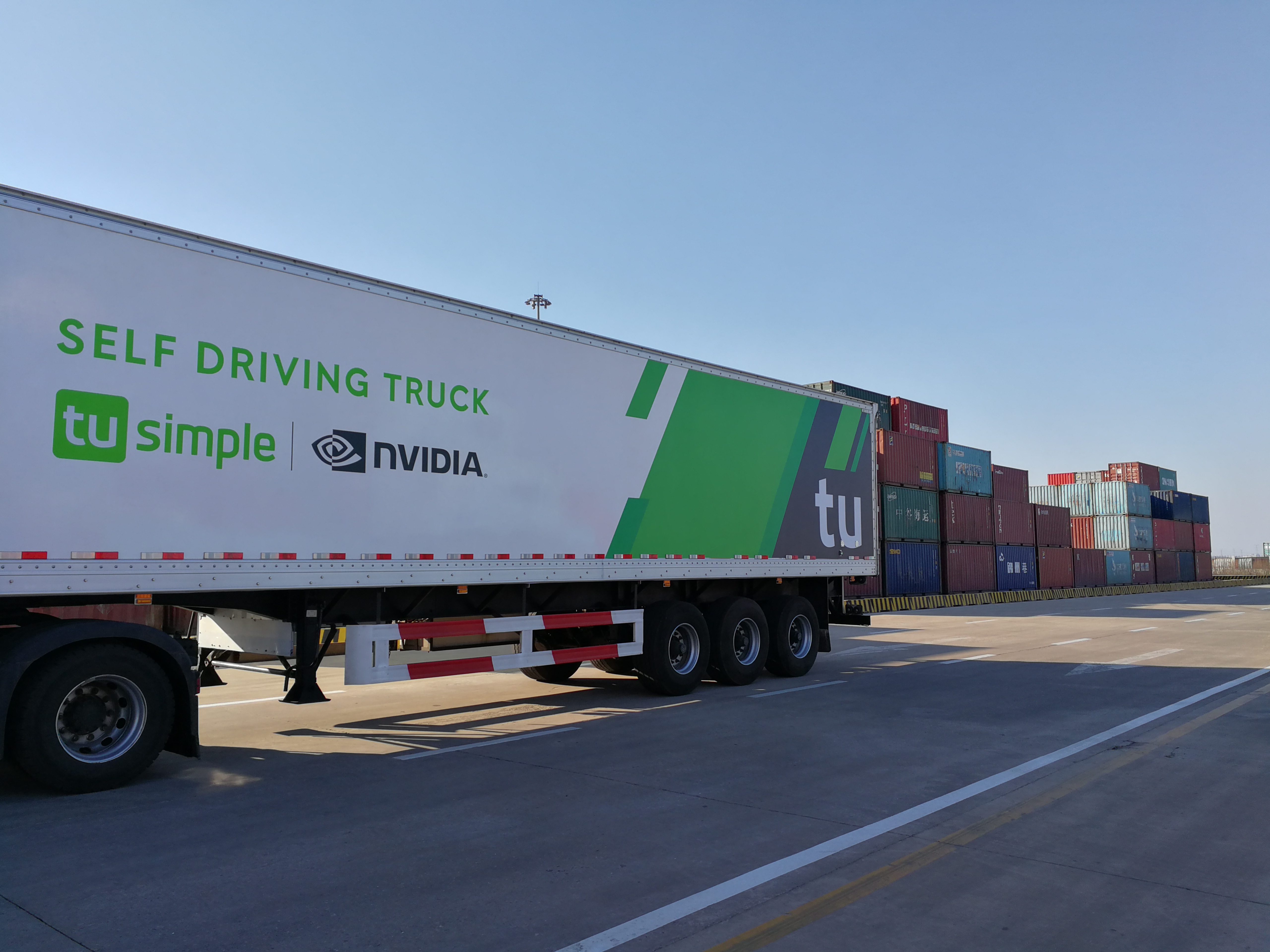 中文（中国大陆）: 图森未来科技（TuSimple）的无人卡车正在中国港口内测试